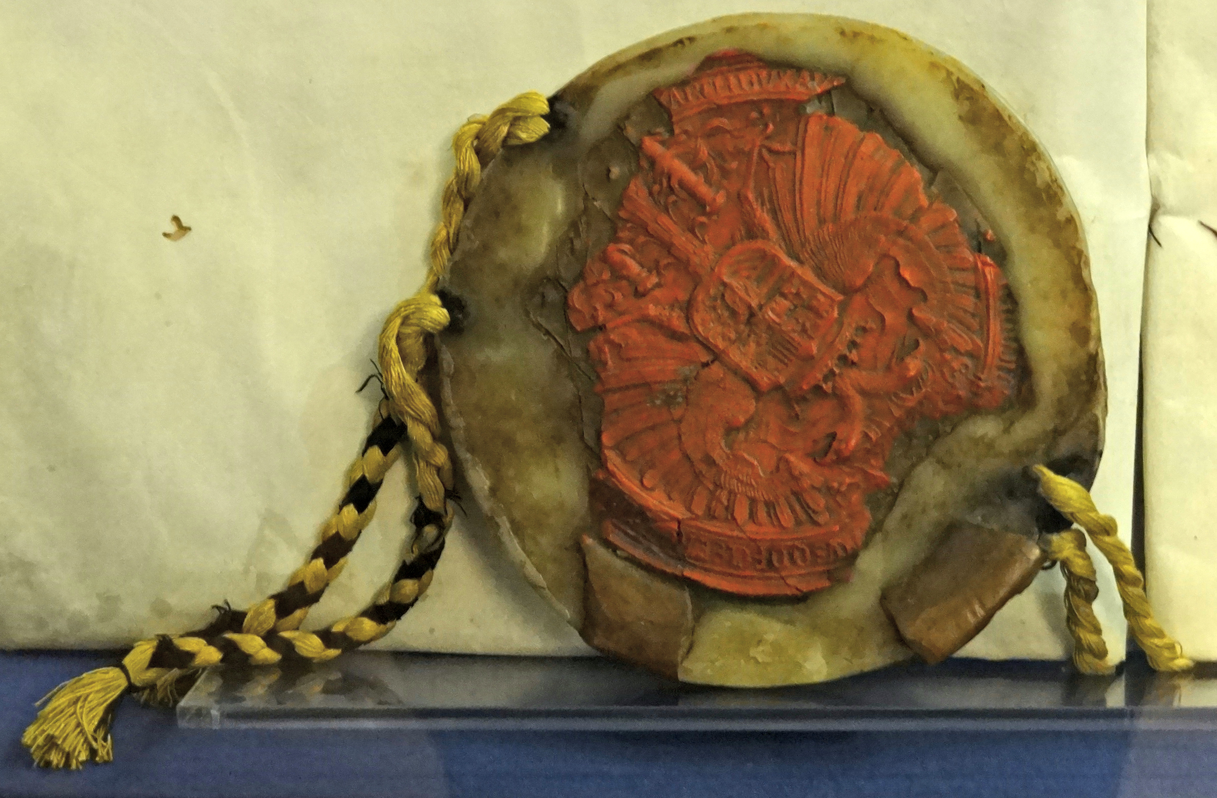 Hinweistafel: "Kammergerichtsurteil, Speyer, 13. November 1531, mit anhängendem Siegel Karls V., Archiv der Katholischen Domgemeinde, vormals Archiv des Marienstifts Wetzlar. Schriftliche Ausfertigungen der mündlich verkündeten Kammergerichtsurteile wurden auf Antrag der Prozessbeteiligten gegen Gebühr von der Gerichtskanzlei hergestellt, vom Leiter der Kanzlei unterschrieben und vom Protonotar gegengezeichnet. Sie waren im Namen des Kaisers geschrieben und mit dessen jeweiligen Siegel versehen. Ein eigenes Siegel führte das Kammergericht nicht."